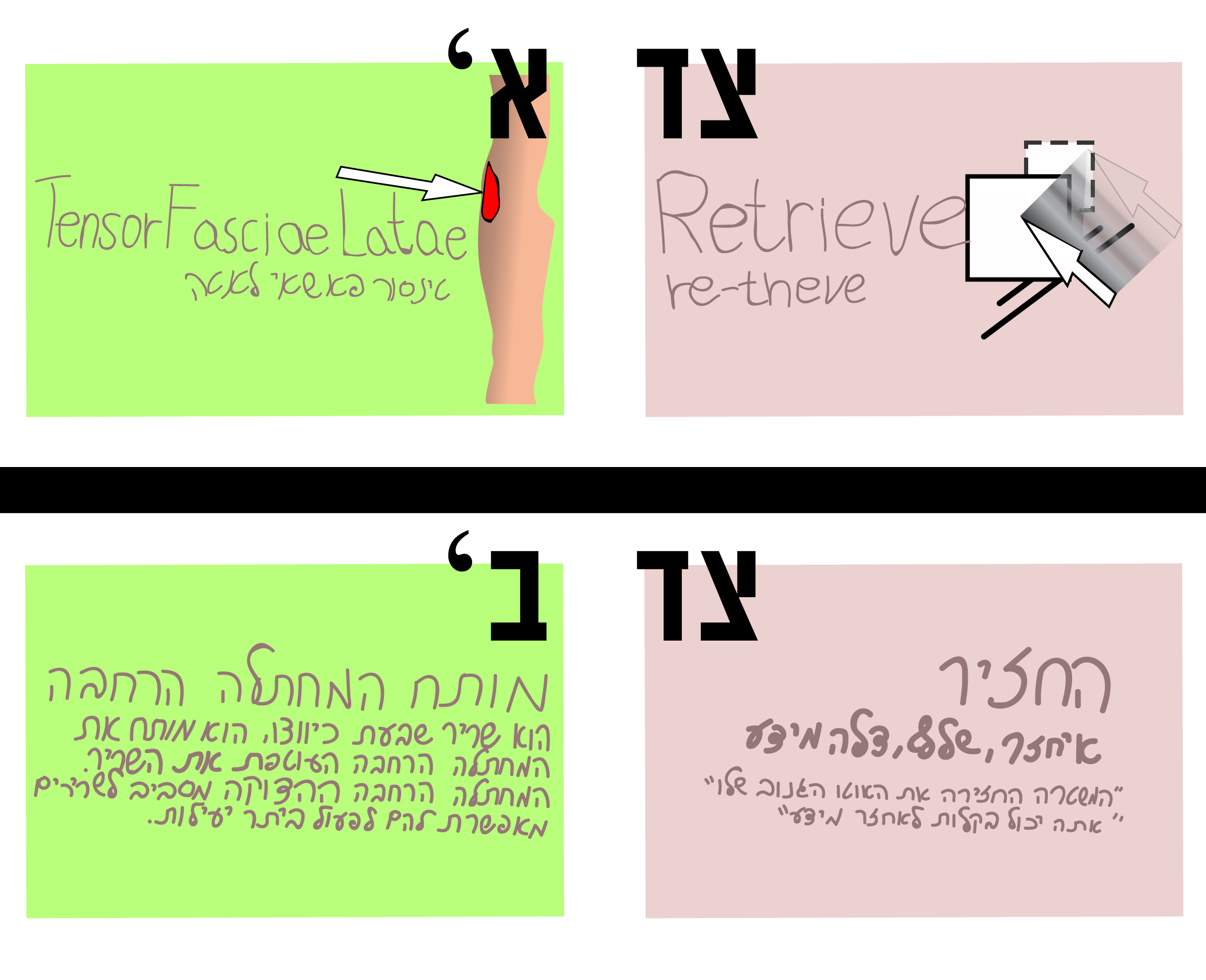 .Two cards with 2 sides & different examples שני כרטיסים דו צדדיים בעליי דוגמאות שונות.